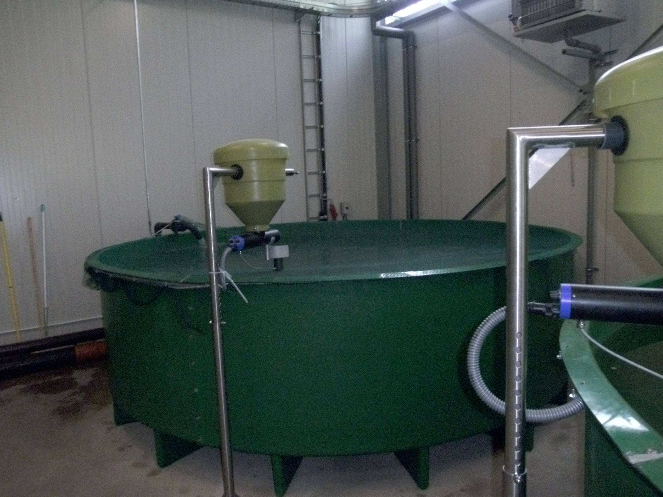 Wenn die Maifisch-Larven älter werden, werden Sie in ein Auszuchtbecken umgesetzt